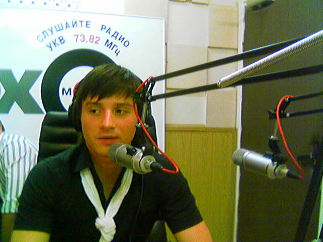 Сергей Лазарев на радио "Эхо Москвы" (2005)